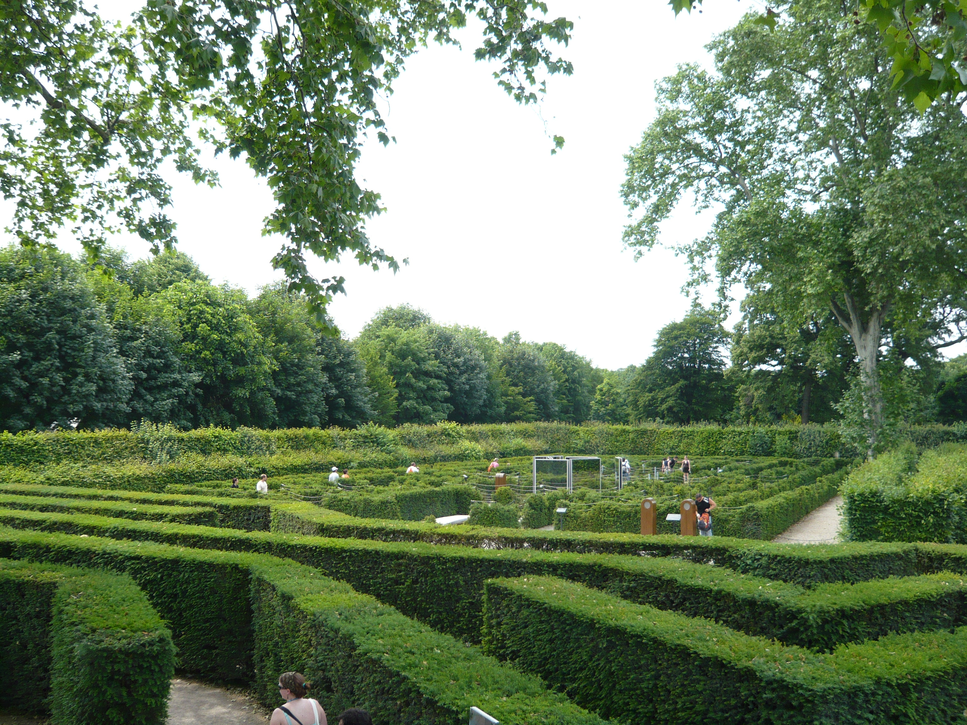 Maze and Labyrinth (Schönbrunn)